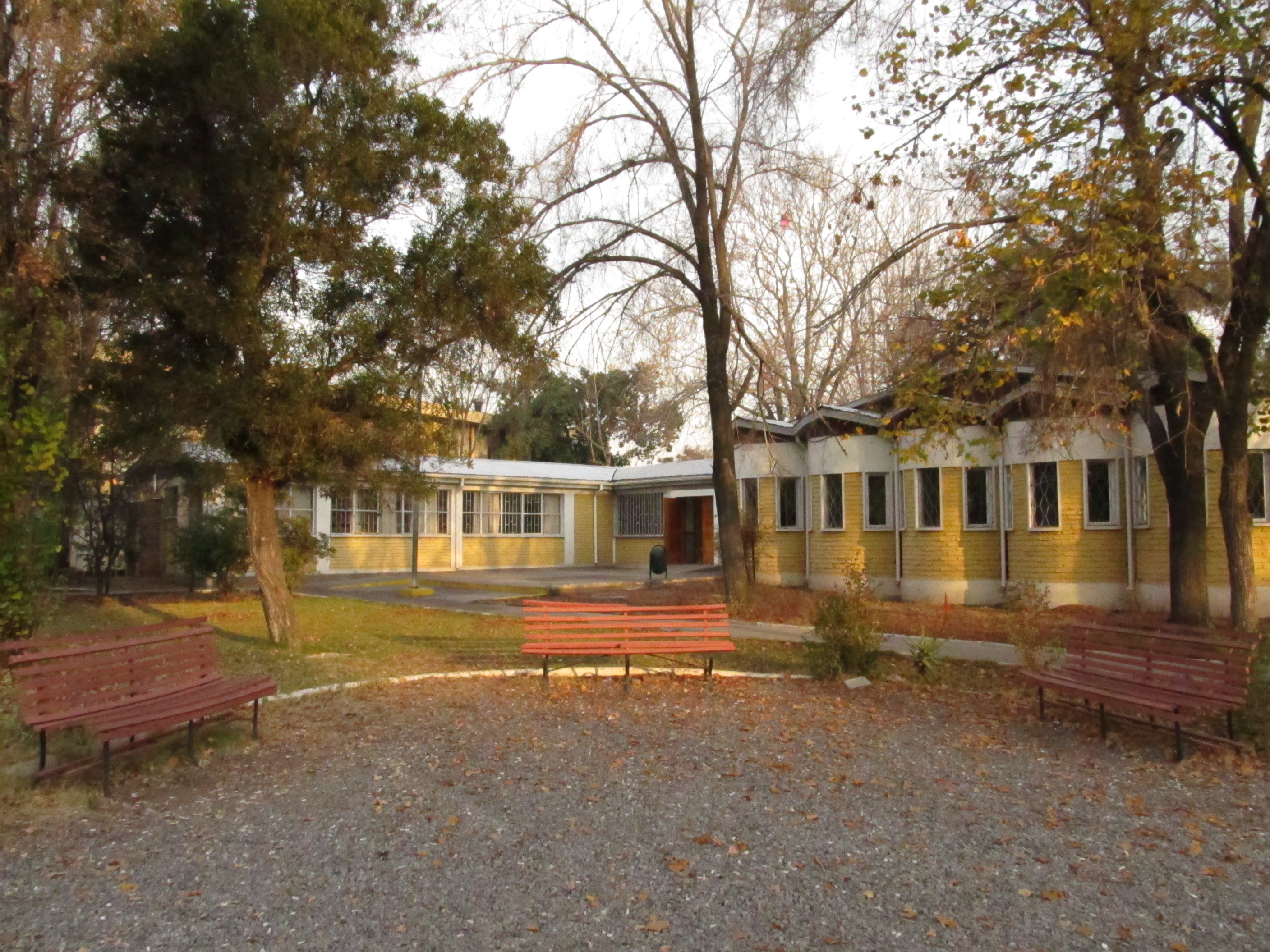 Interior Hospital Psiquiátrico José Horwitz, Santiago.